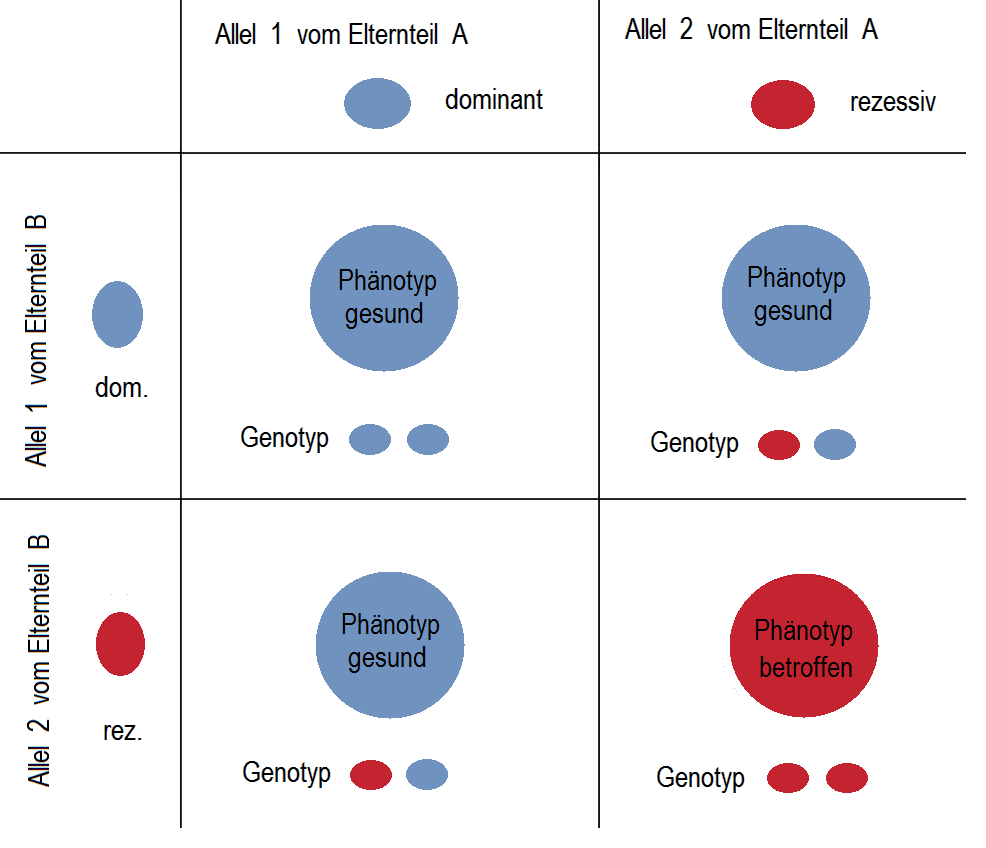 Konduktoren